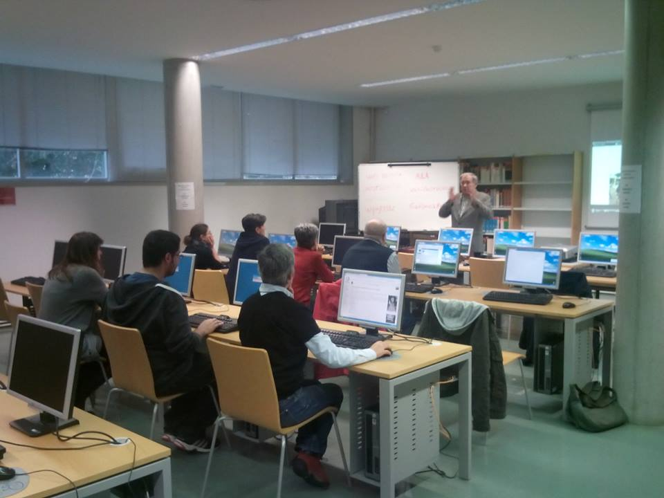 Sesión de traballo do Editatón do Día da Ciencia en Galego